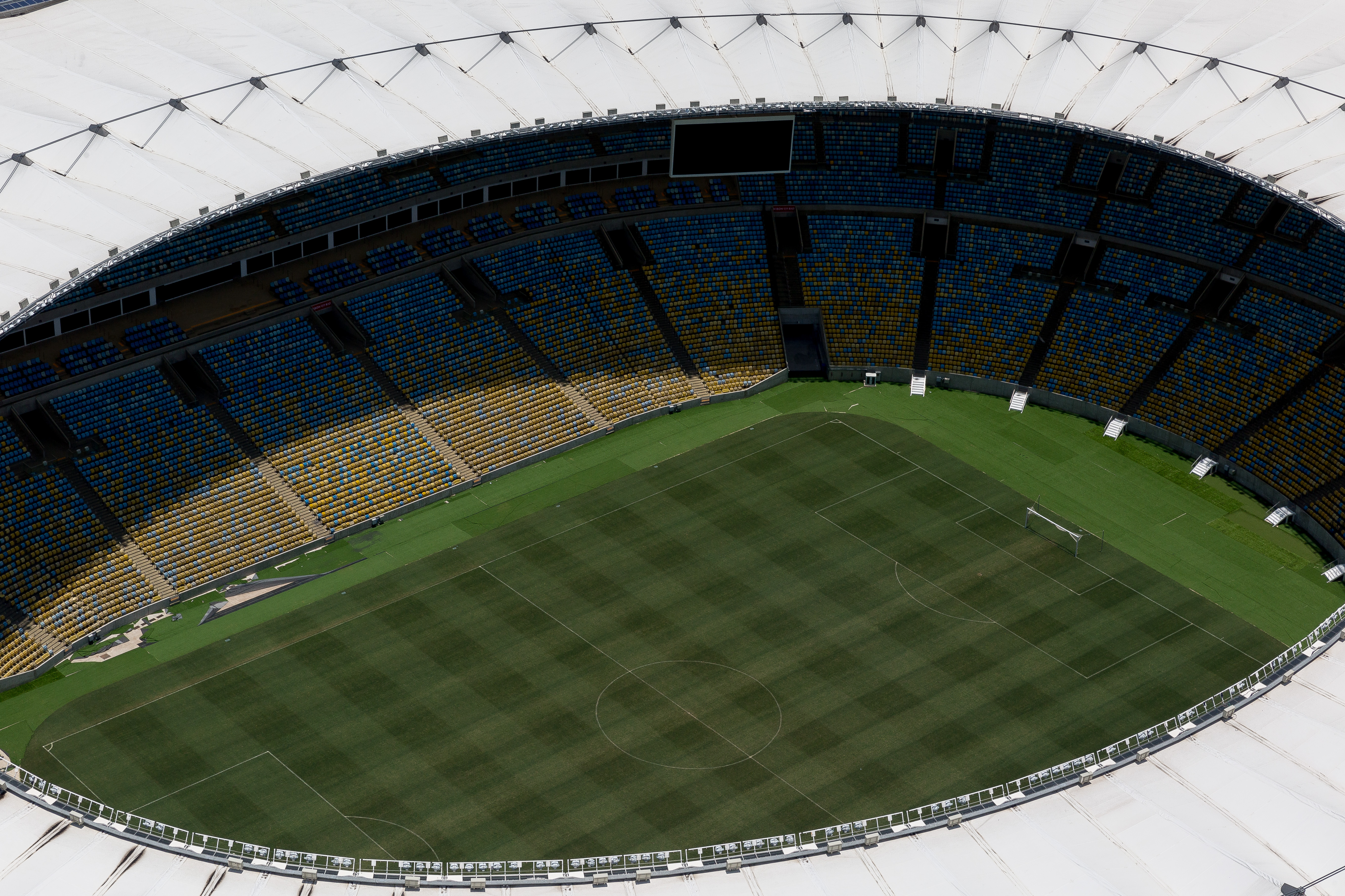 Vista aérea do estádio Maracanã, localizado na cidade do Rio de Janeiro.